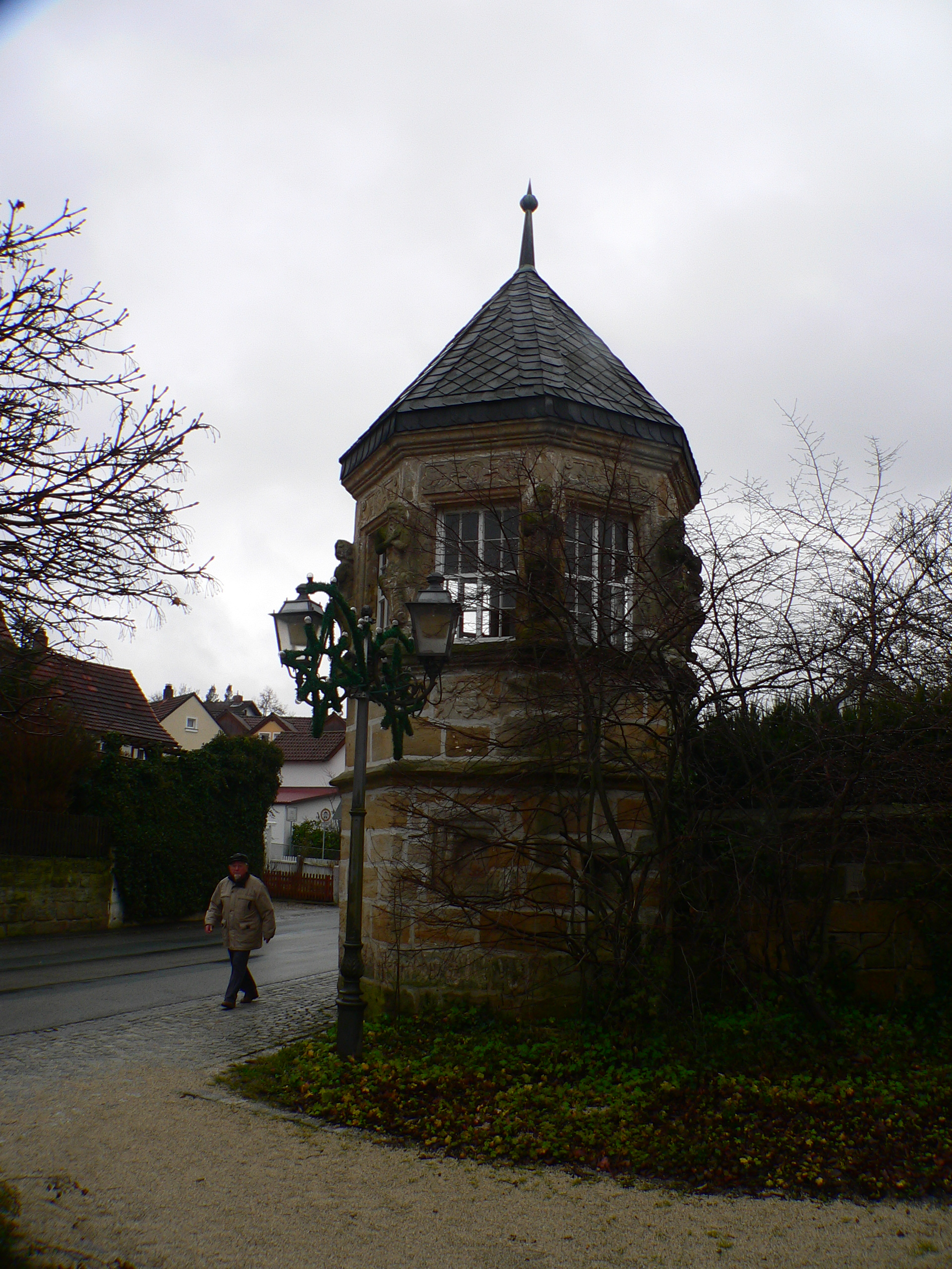 Hinteres (Neues) Schloss in Küps, Bayern, Regierungsbezirk Oberfranken, Landkreis Kronach – „Planturm“